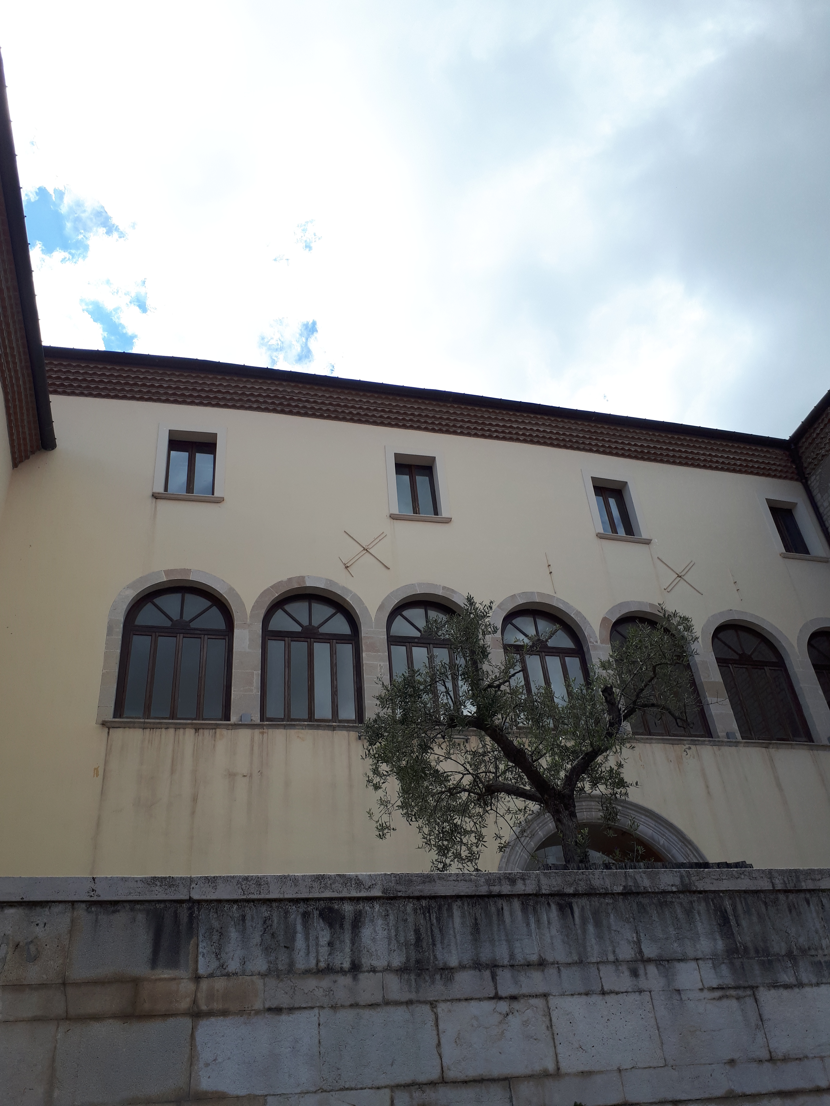 Ingresso di Palazzo Loffreso